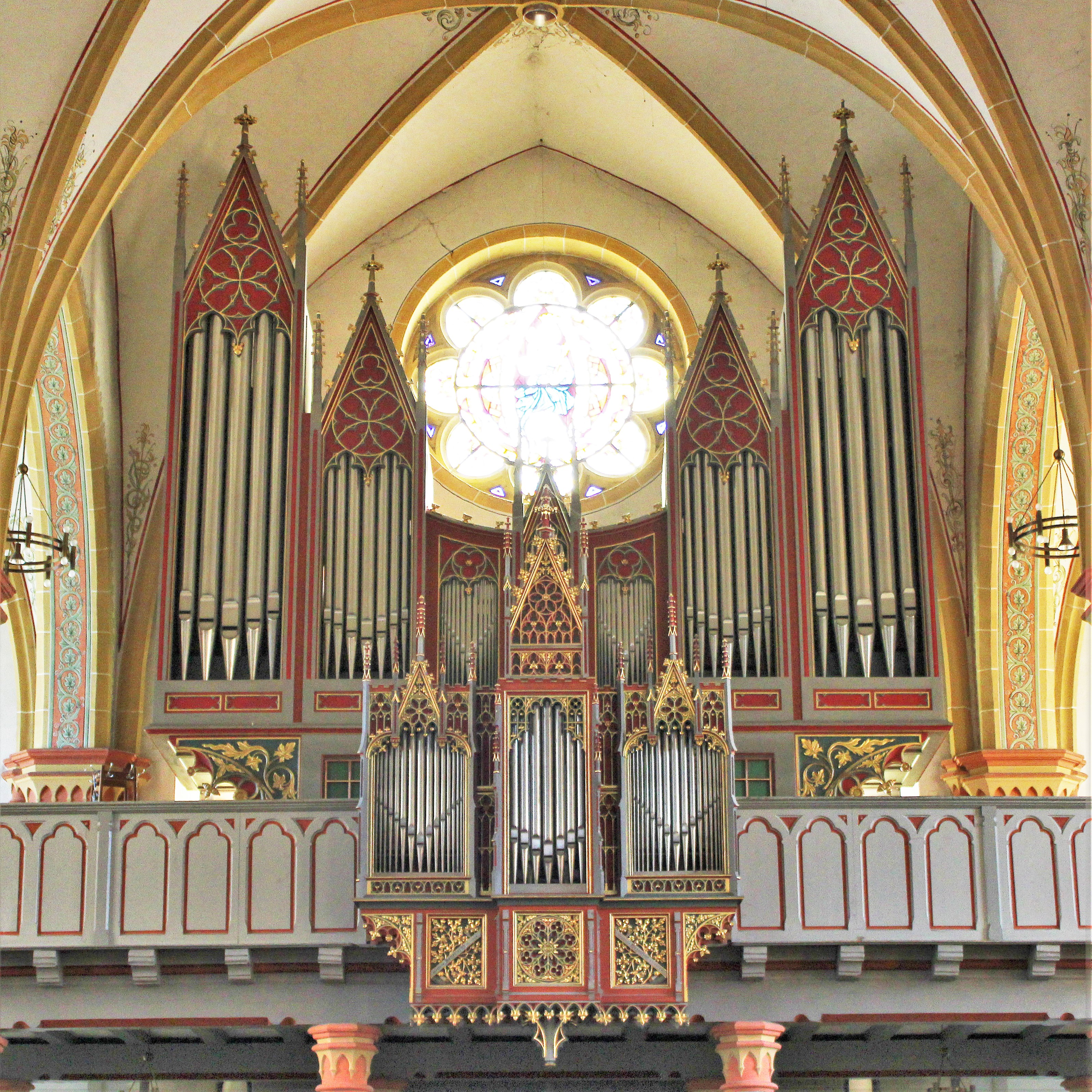 Orgelprospekt der katholischen Pfarrkirche Mariä Himmelfahrt in Marpingen, Landkreis St. Wendel, Saarland